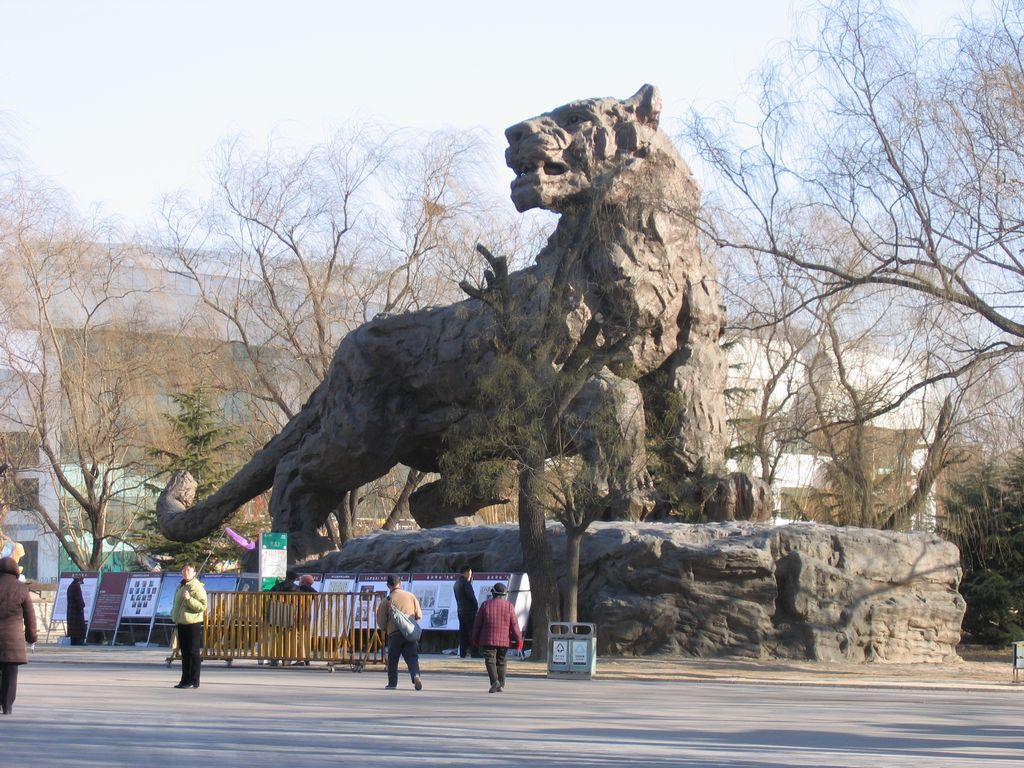 Stone tiger in Zoo